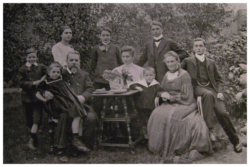 Familie Gustav von Rohden,29.09.1906